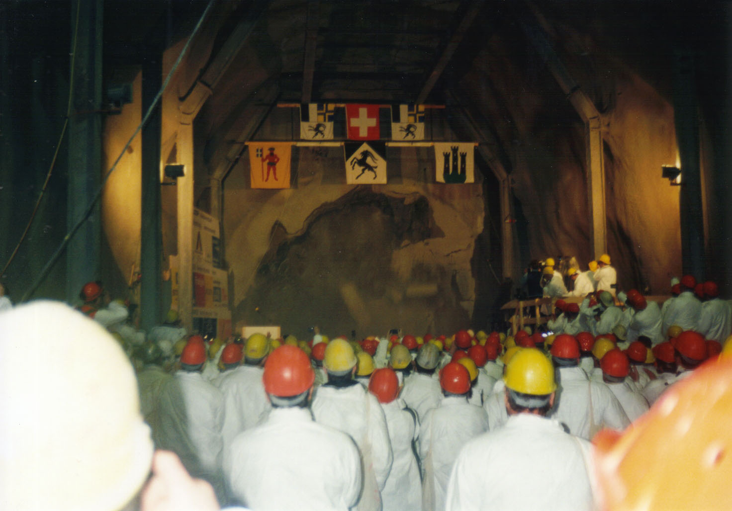 Durchschlag des Vereinatunnels am 26. März 1997 Sonstiges